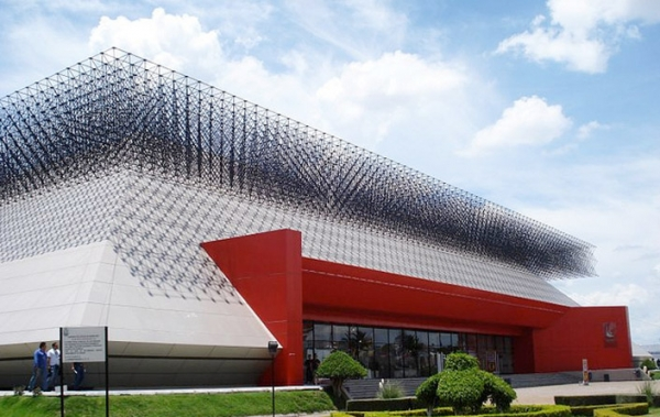 Fachada Principal del Auditorio Josefa Ortíz de Domínguez Querétaro